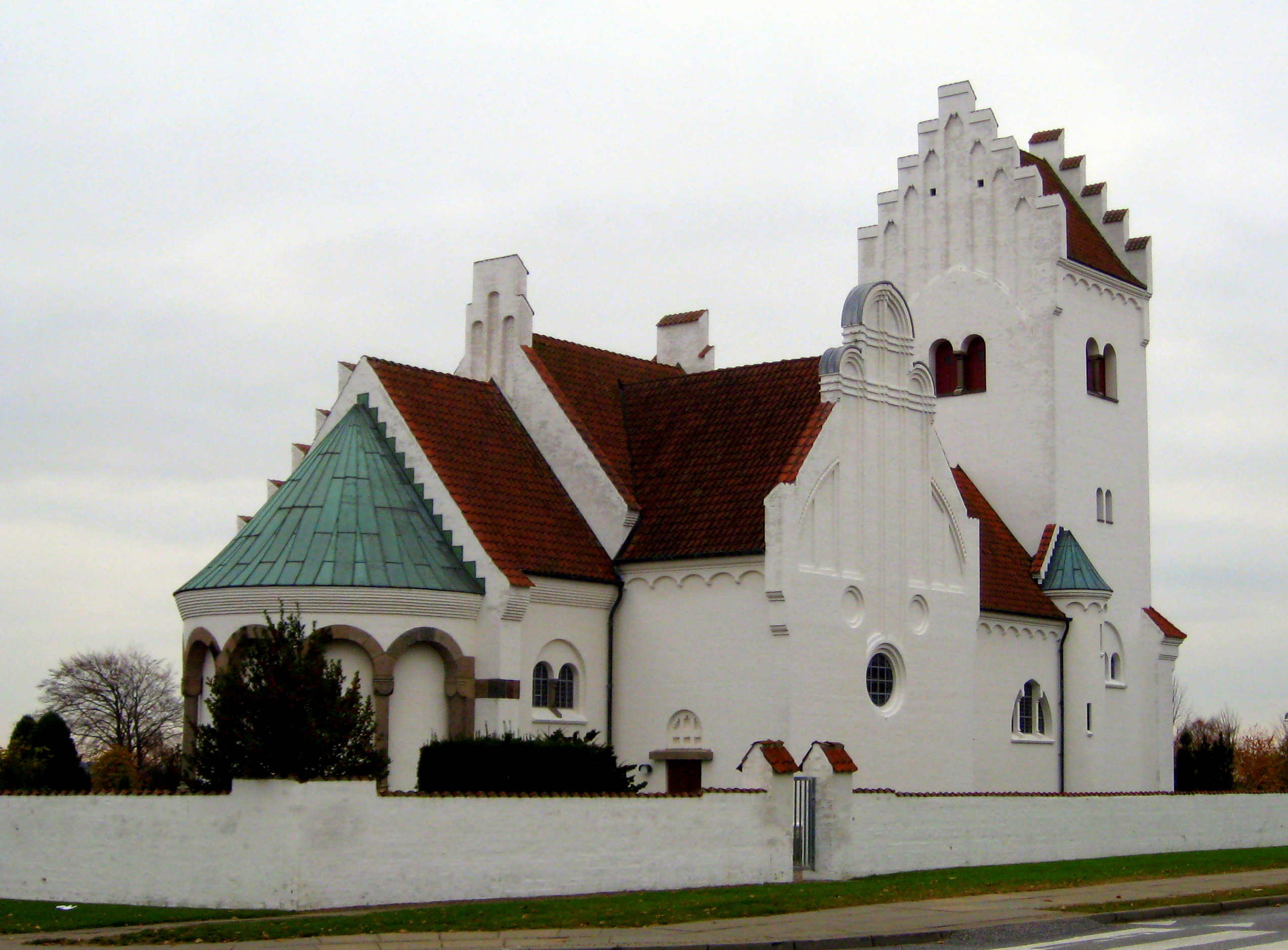 Vodskov Kirke